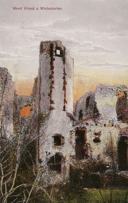 Kolorovaná pohľadnica z medzivojnového obdobia - Hrad Vinná u Michaloviec